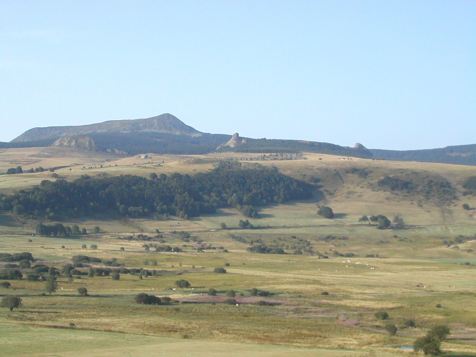 Vue depuis le col à l'entrée du village, depuis le Nord